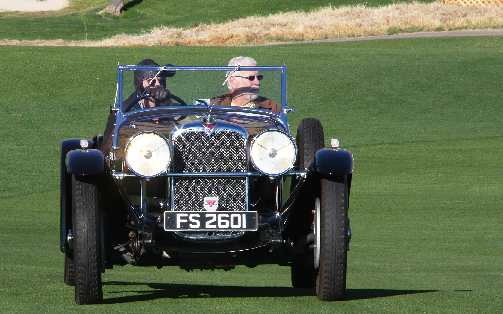 2011 Desert Classic, La Quinta, CA